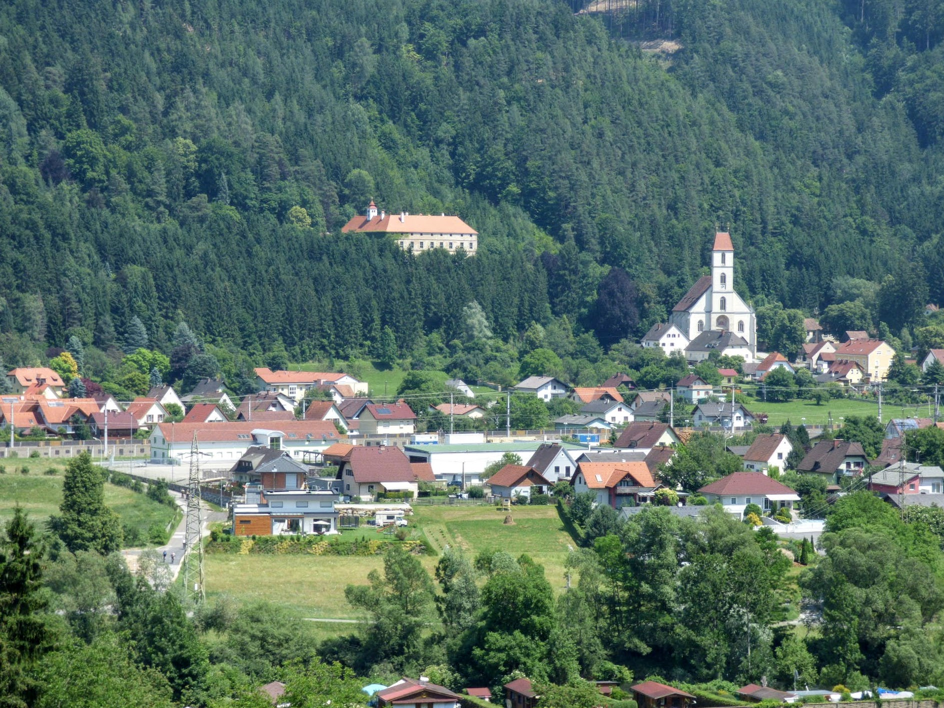 Pernegg an der Mur (Blick auf den Ort, von Kirchdorf aus)